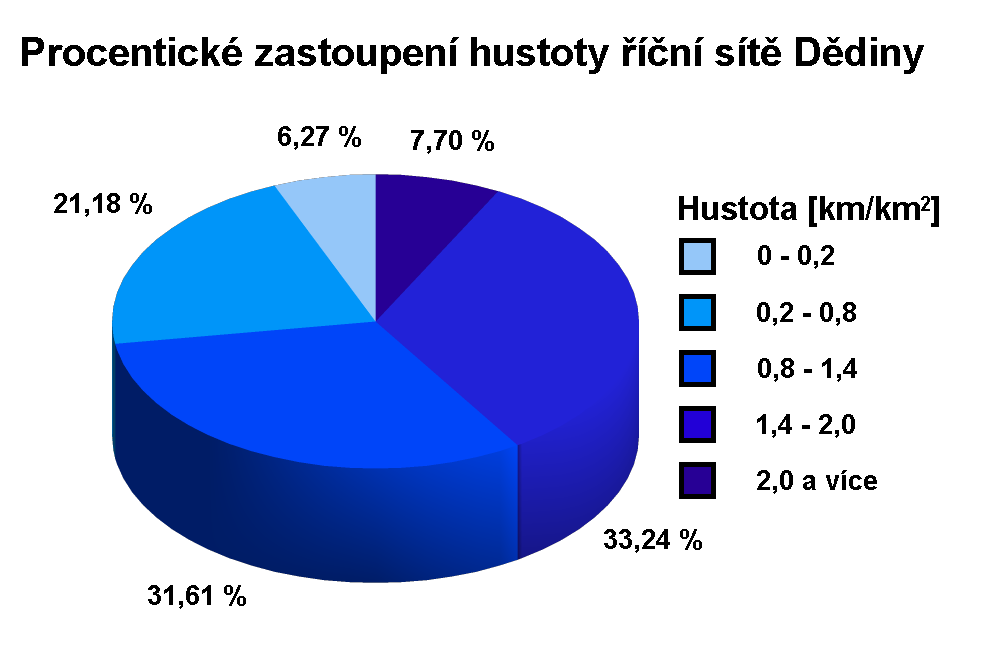 Procentické zastoupení hustoty říční sítě Dědiny